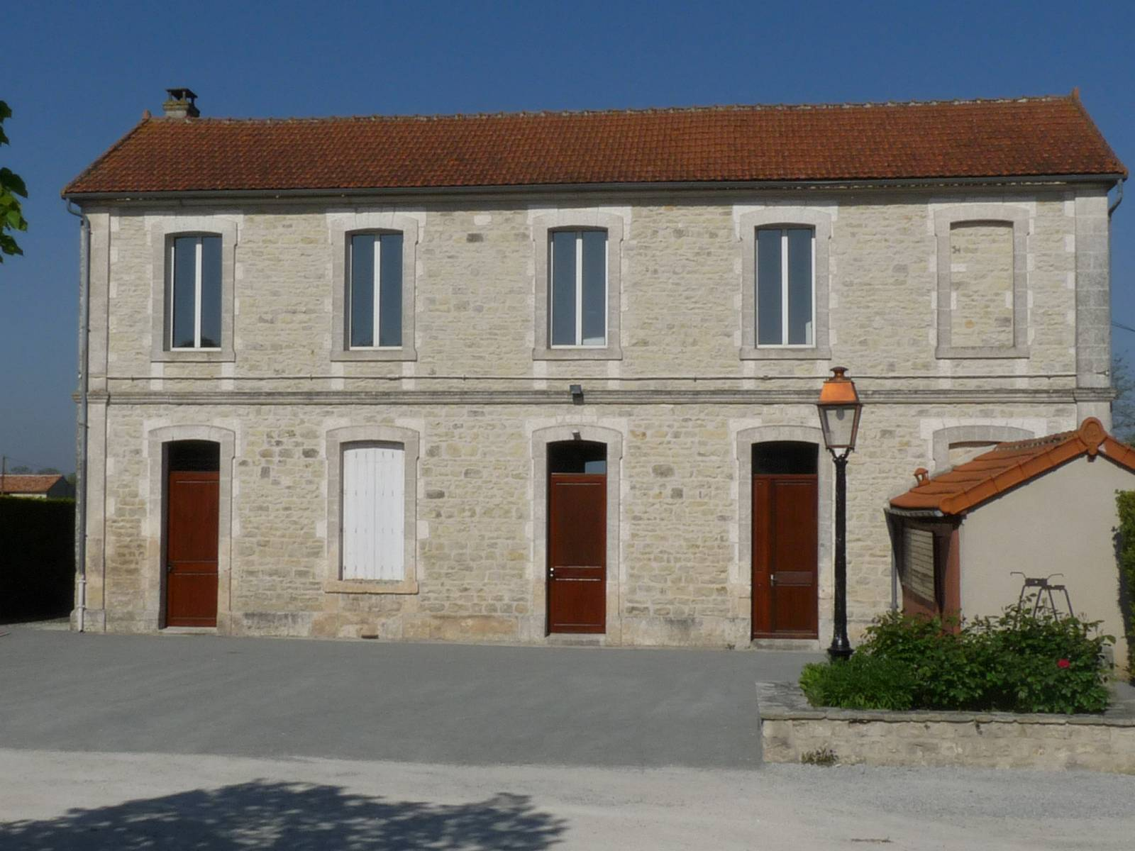 Mairie de Coulonges, Charente, France